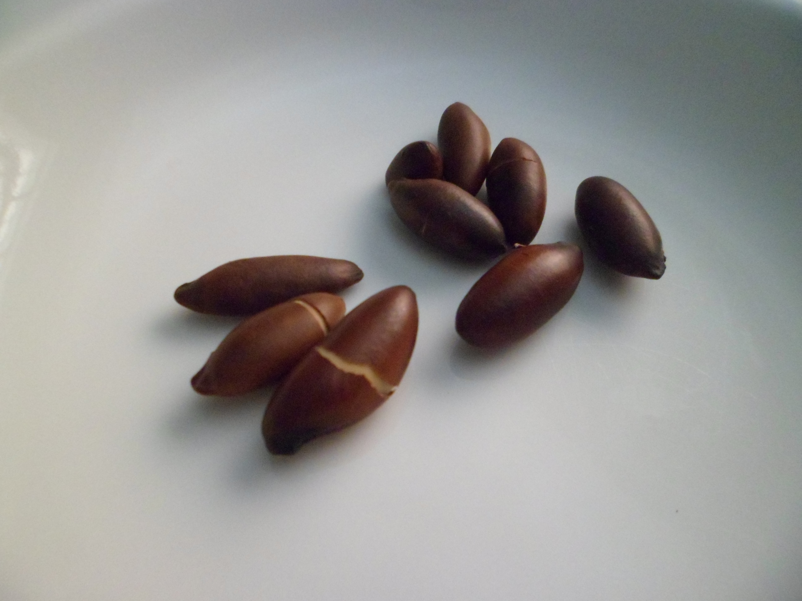 Castanhas de Baru (Dipteryx alata) em cima de um prato.